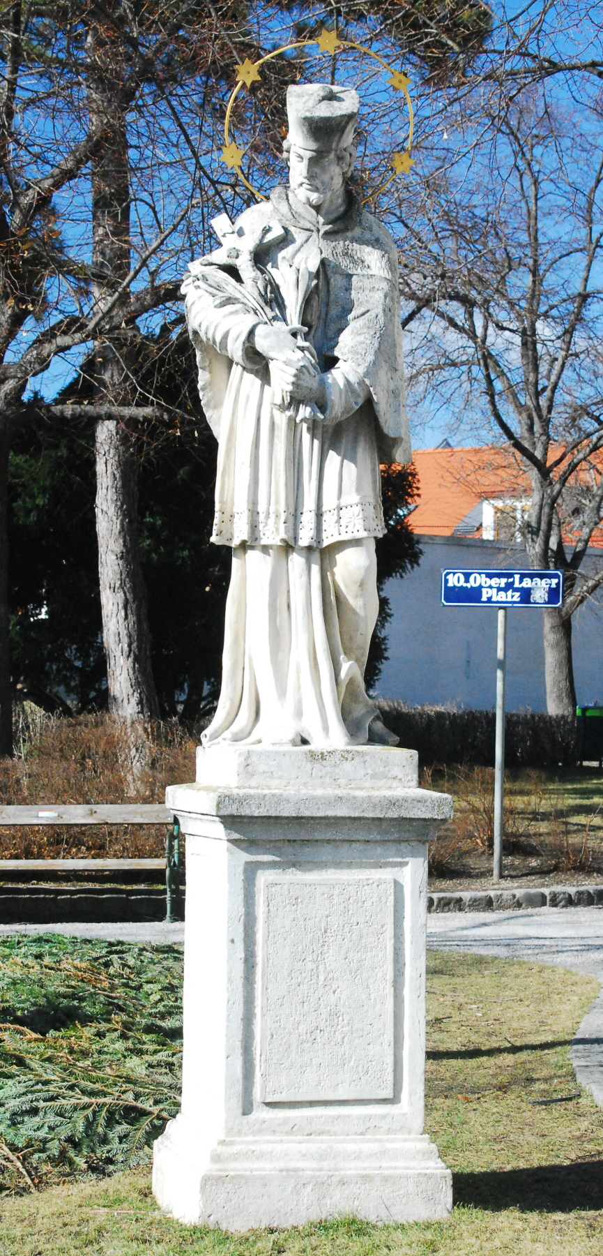 Statue Johannes Nepomuks auf dem Oberlaaer Platz in Wien-Favoriten